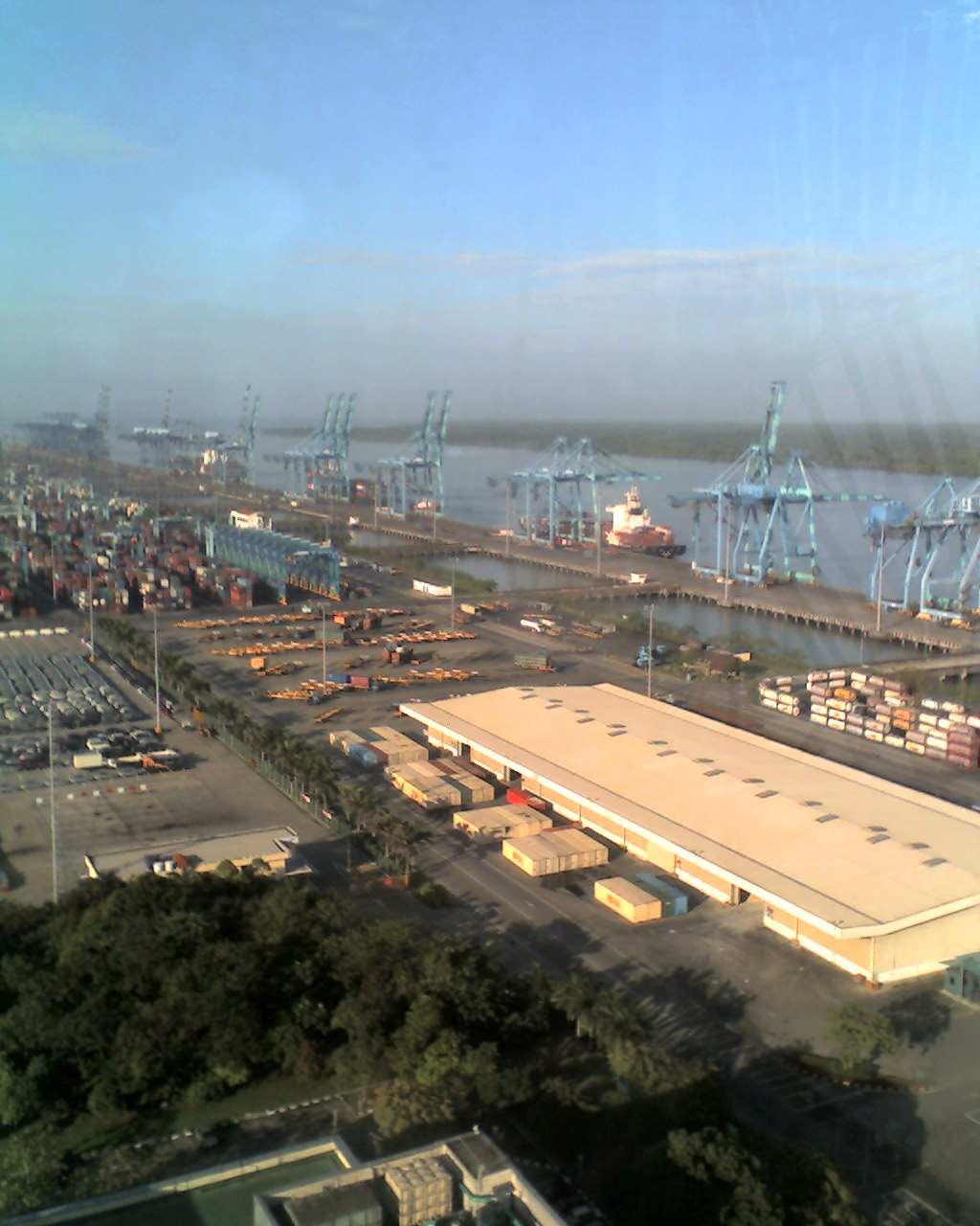 Pelabuhan barat